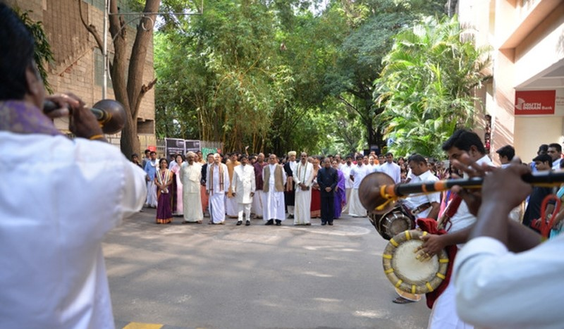 ಕನ್ನಡ: ಭಾಷಾ ಉತ್ಸವ